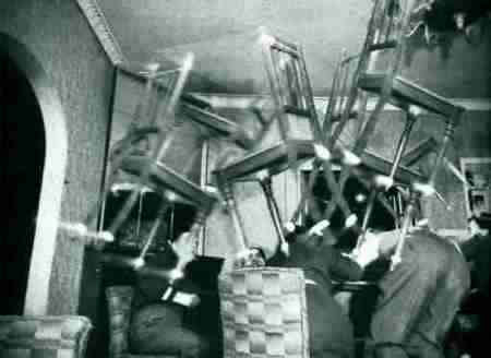 fotografía del fenómeno paranormal «baúl del monje»